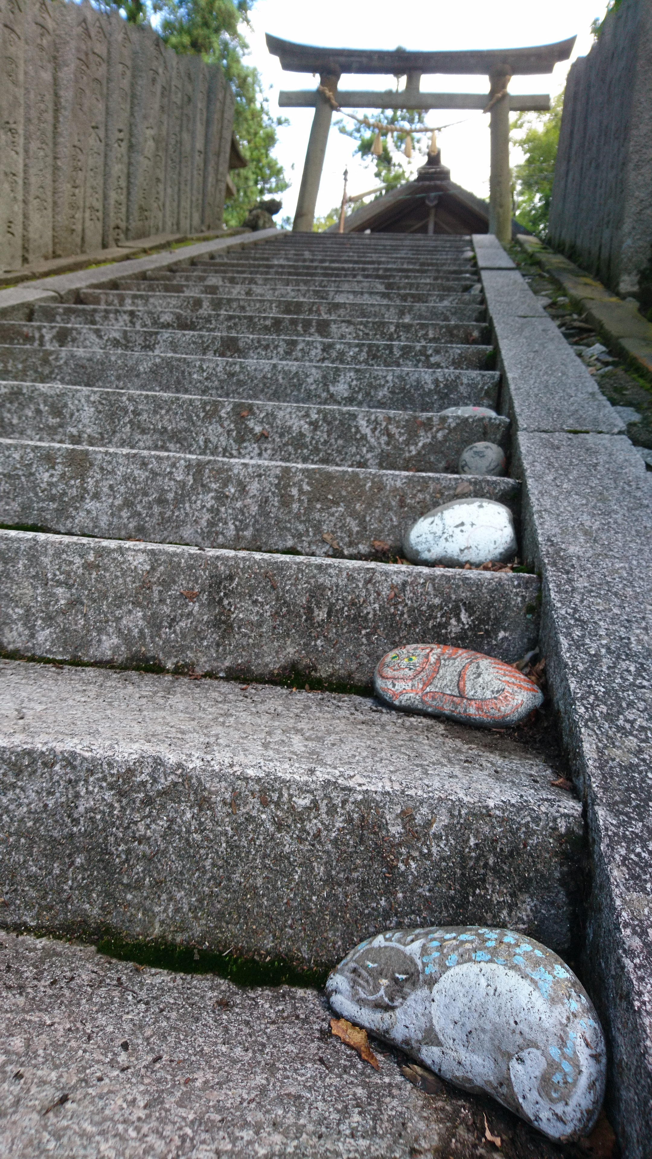 金刀比羅神社の境内の石階段